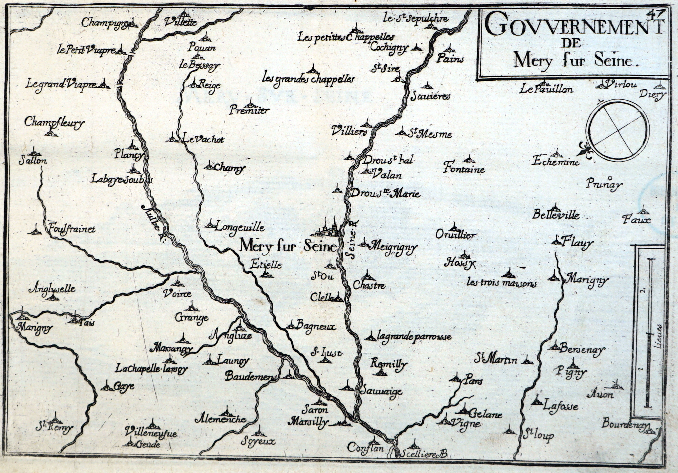 le gouvernement de Méry sur un document Davanne Chapier